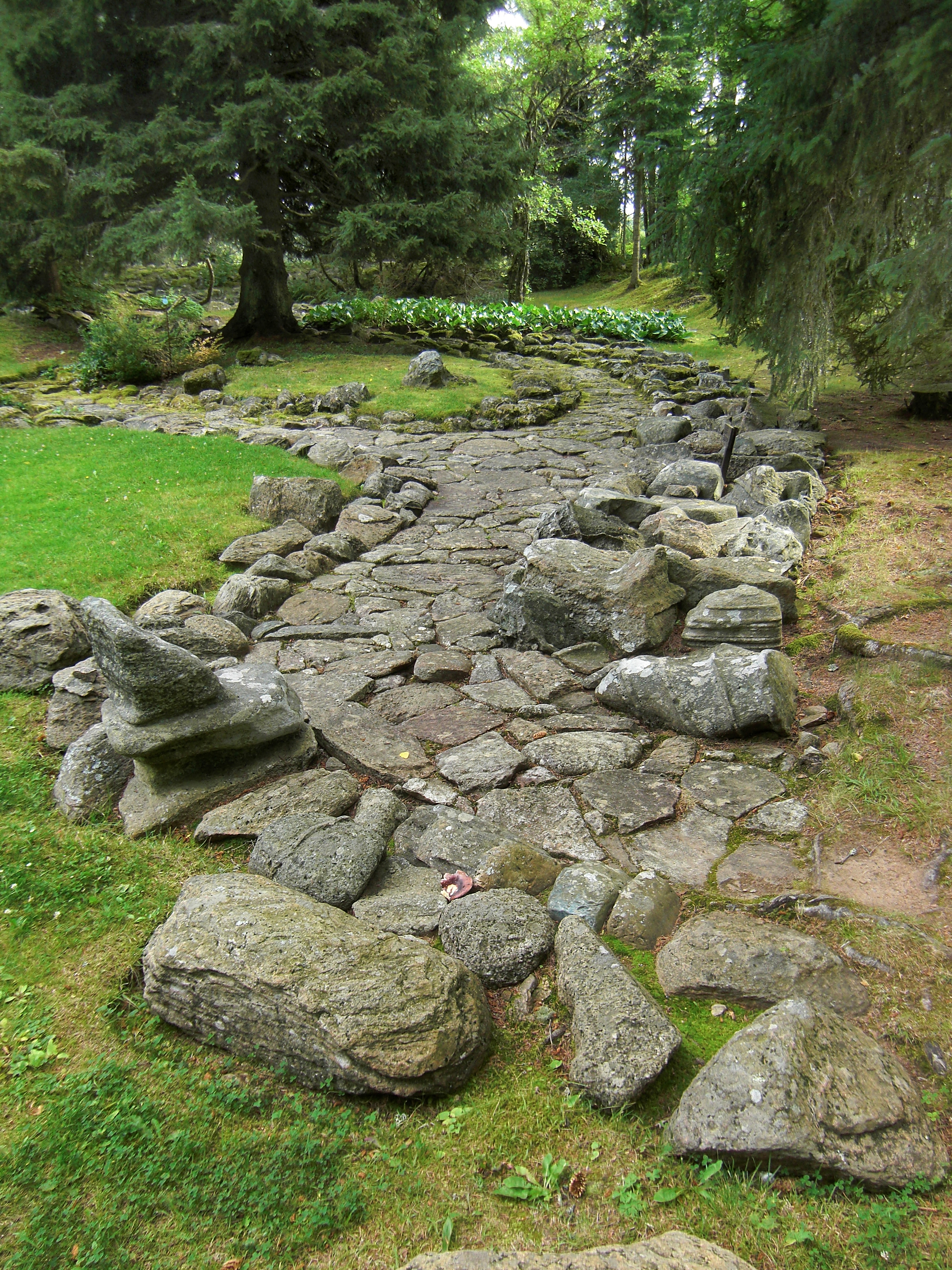 Den Döda Floden på Alphems arboretum sägs vara en japansk trädgårdsidé. Alphems arboretum ligger i Floby socken i Vilske härad, Falköpings kommun, f.d. Skaraborgs län, Västergötland, Västra Götaland, Sverige.